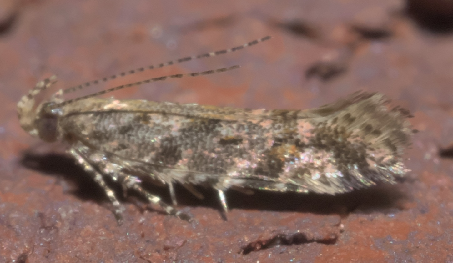 Aristotelia rubidella, Hodges #1762, Size: 4.3 mm, ID Confidence: 88